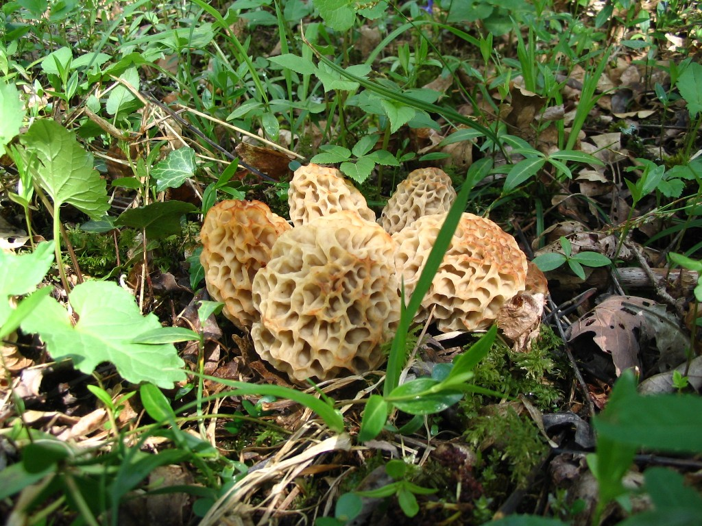 Morchella rotunda from France, Savoie. In situ.Morilles